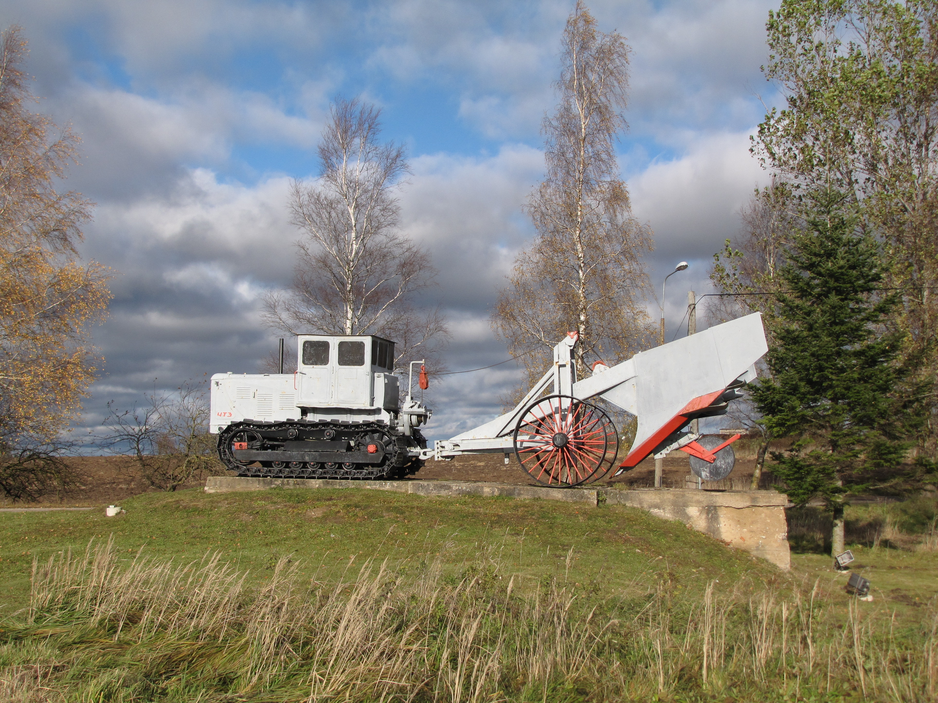 Lutriņu pag.